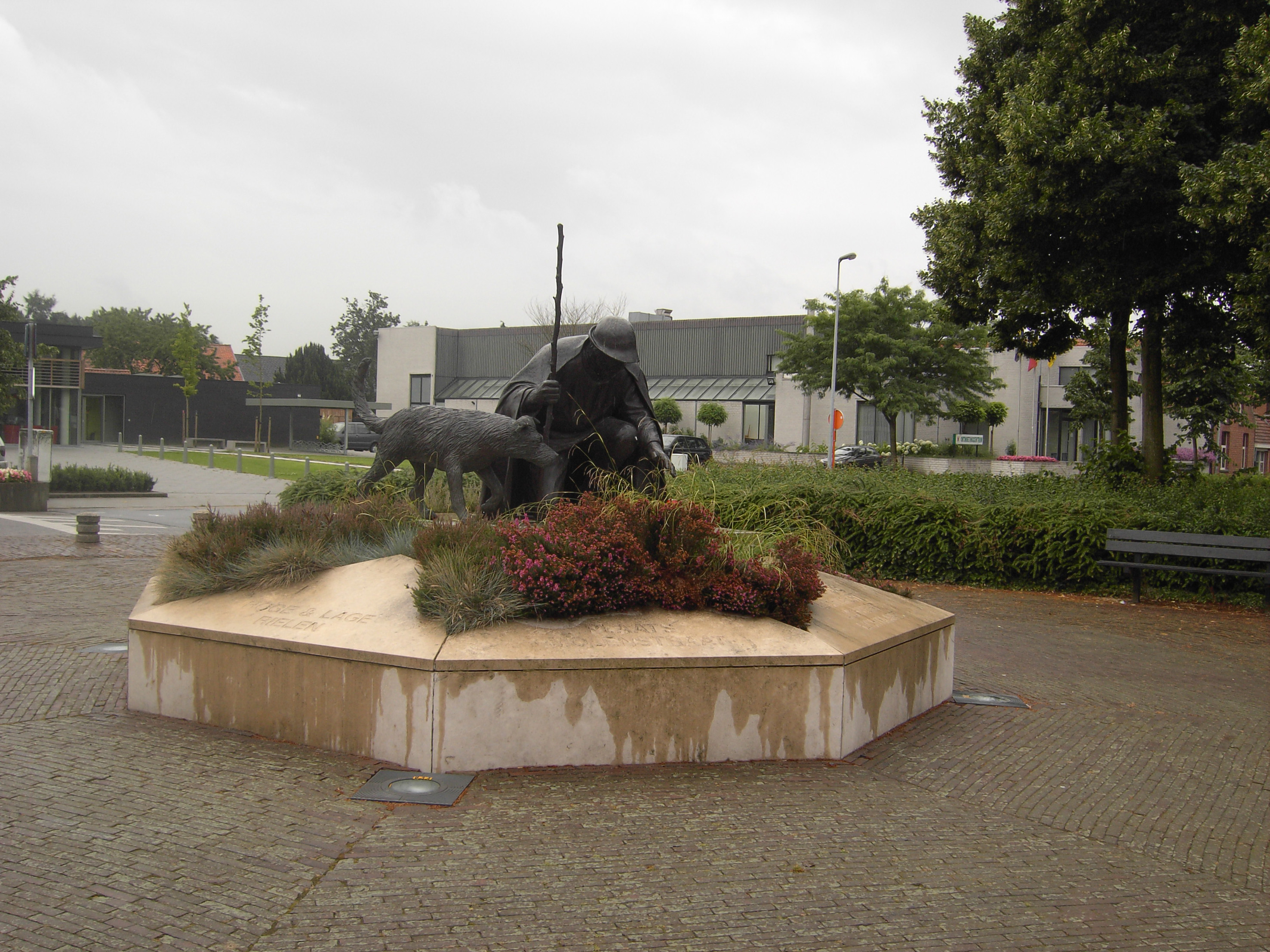 Op het marktplein in Lichtaart wordt in 2000 een bronzen monument ingehuldigd dat niet alleen de oorsprong van het dorp symboliseert, maar ook een icoon wil zijn voor het leven van het Kempense volk in de vorige eeuw. Op een zandstenen voet met de namen van de Lichtaartse gehuchten kijkt de herder Wannes naar de lichtende gloed die hem vanuit de aarde tegemoet komt (Lichtaart, lift-erde), naar één van de vele legendes rond het ontstaan van het dorp. Kunstenaar van dit beeld is Tom Frantzen.